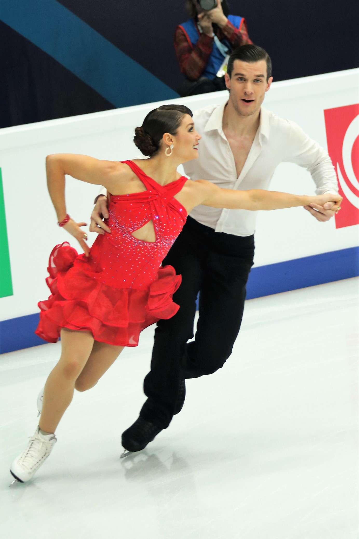 Лоуренс Фурнье-Бодри / Николай Сёренсен (Дания) на Чемпионате Европы по фигурному катанию 2018.